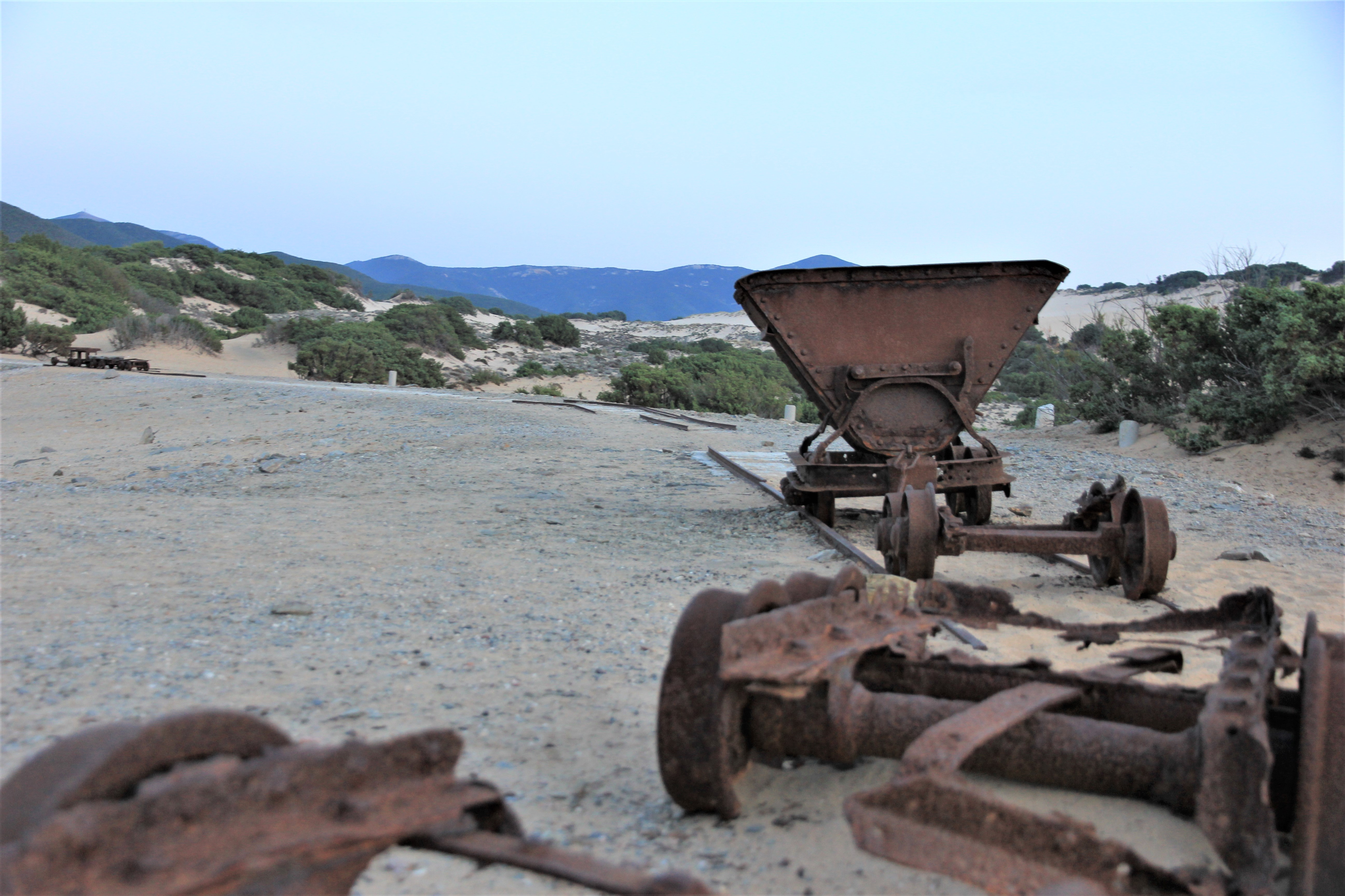 Arbus - Miniera di Naracauli